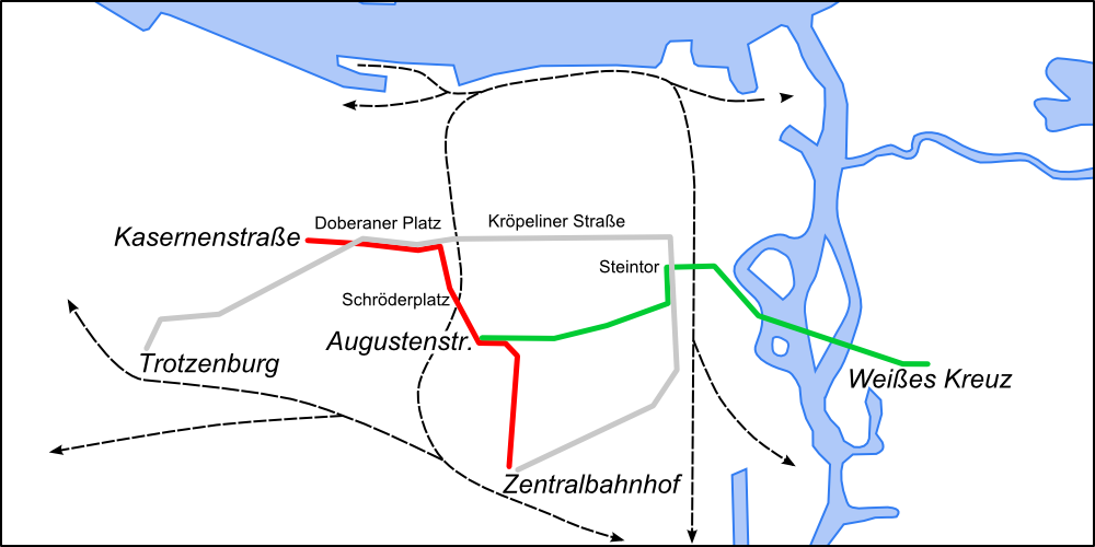 Straßenbahnnetz in Rostock, Stand 1904